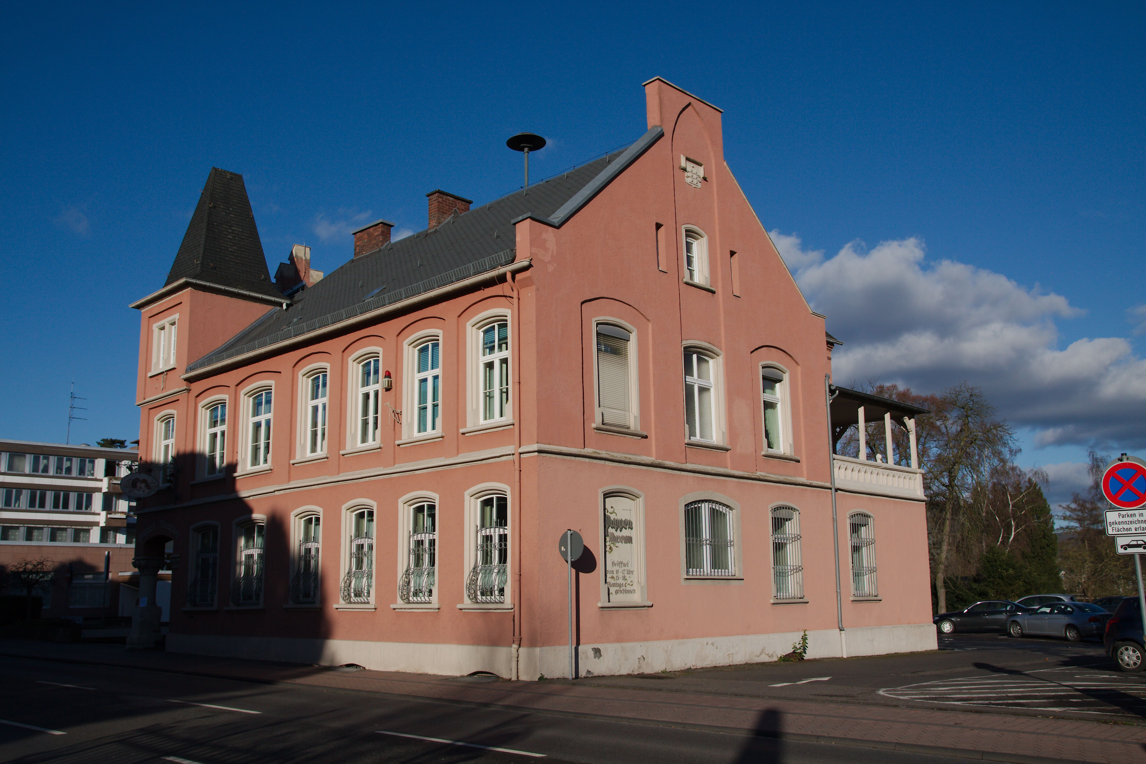 Altes Rathaus in Bad Breisig, das jetzt als Puppenmuseum genutzt wird